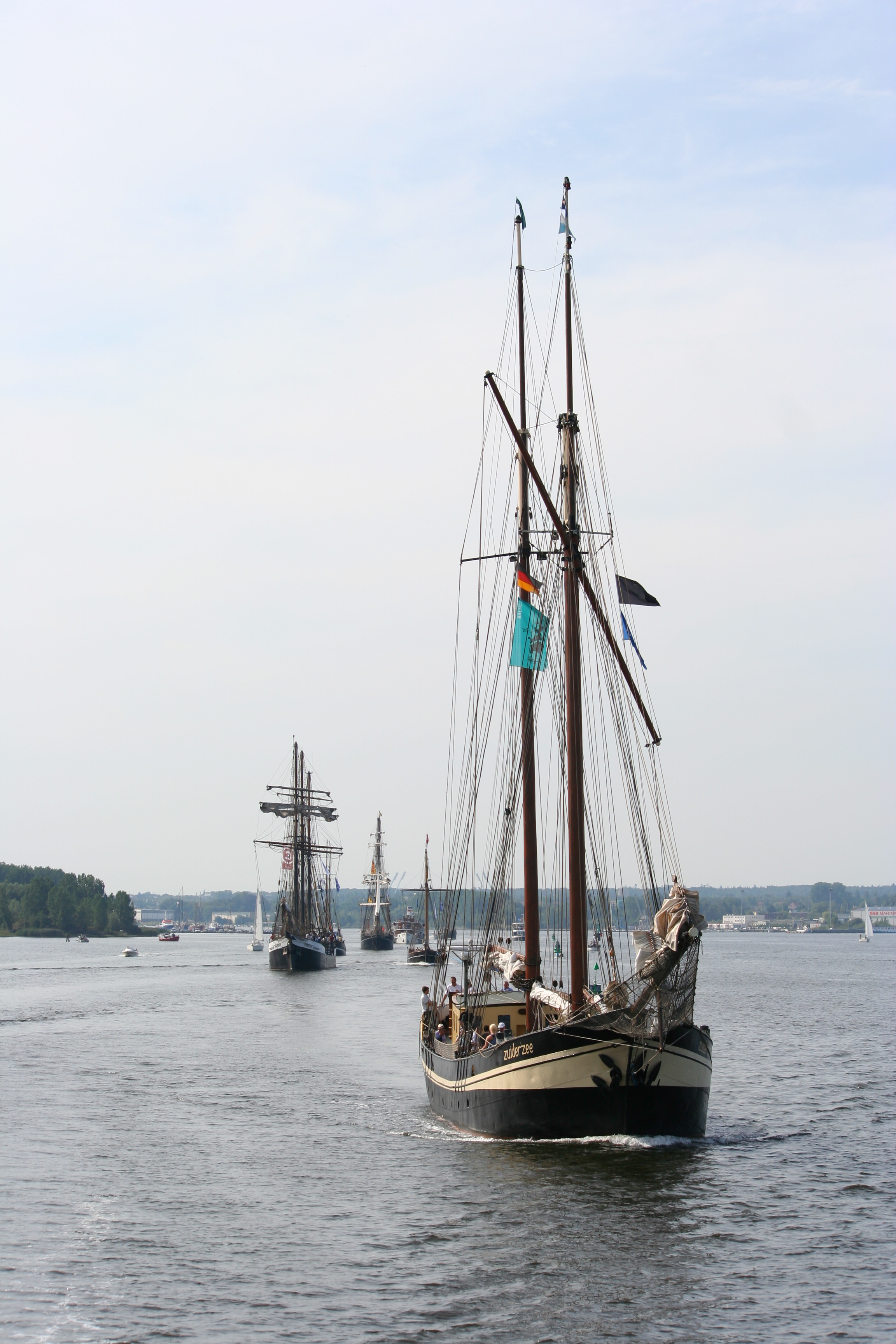 Das Segelschiff ‚Zuiderzee‘ bei der Hanse Sail 2009 in Rostock